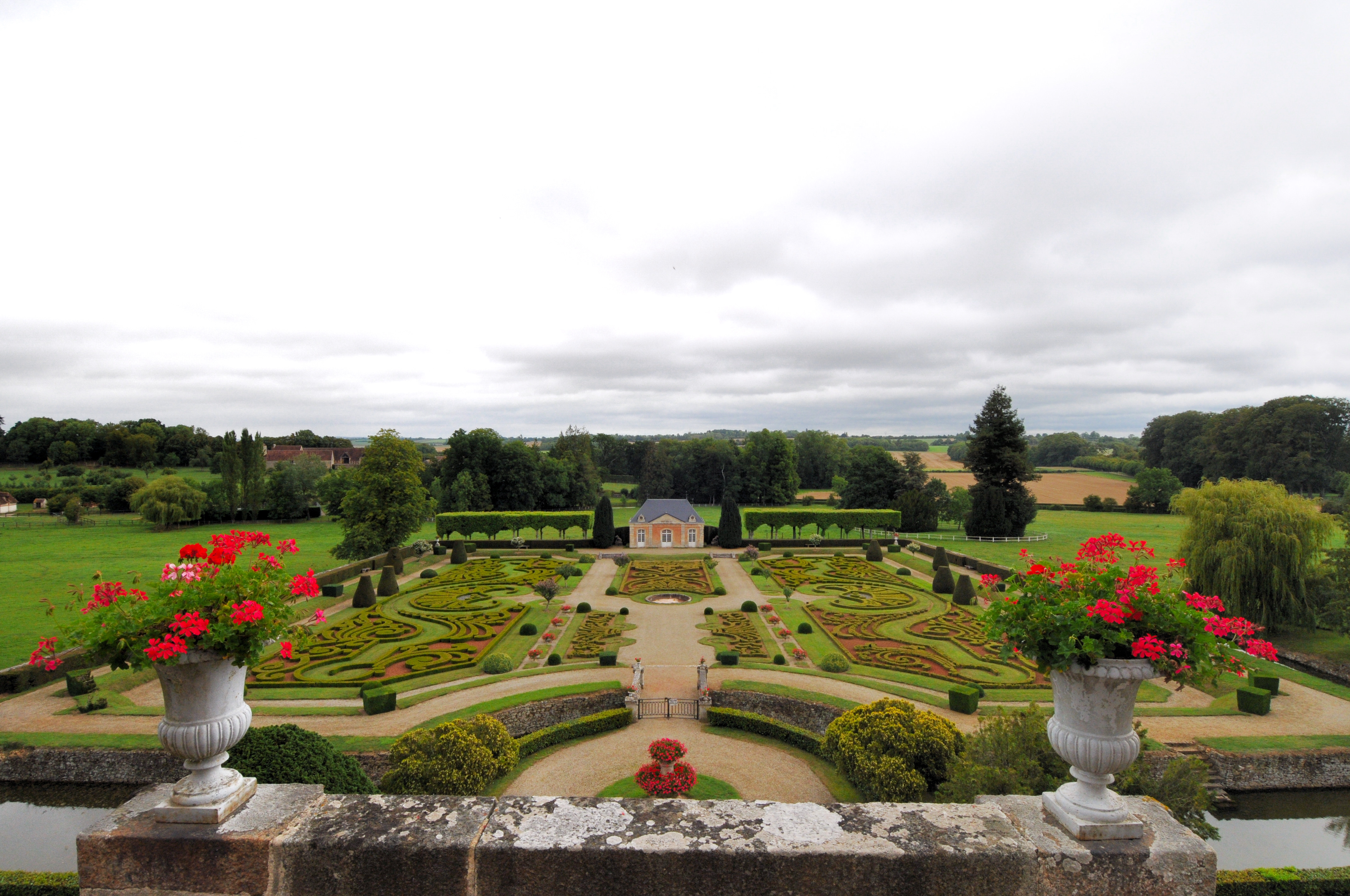 le jardin du château de Sassy dans l'Orne.